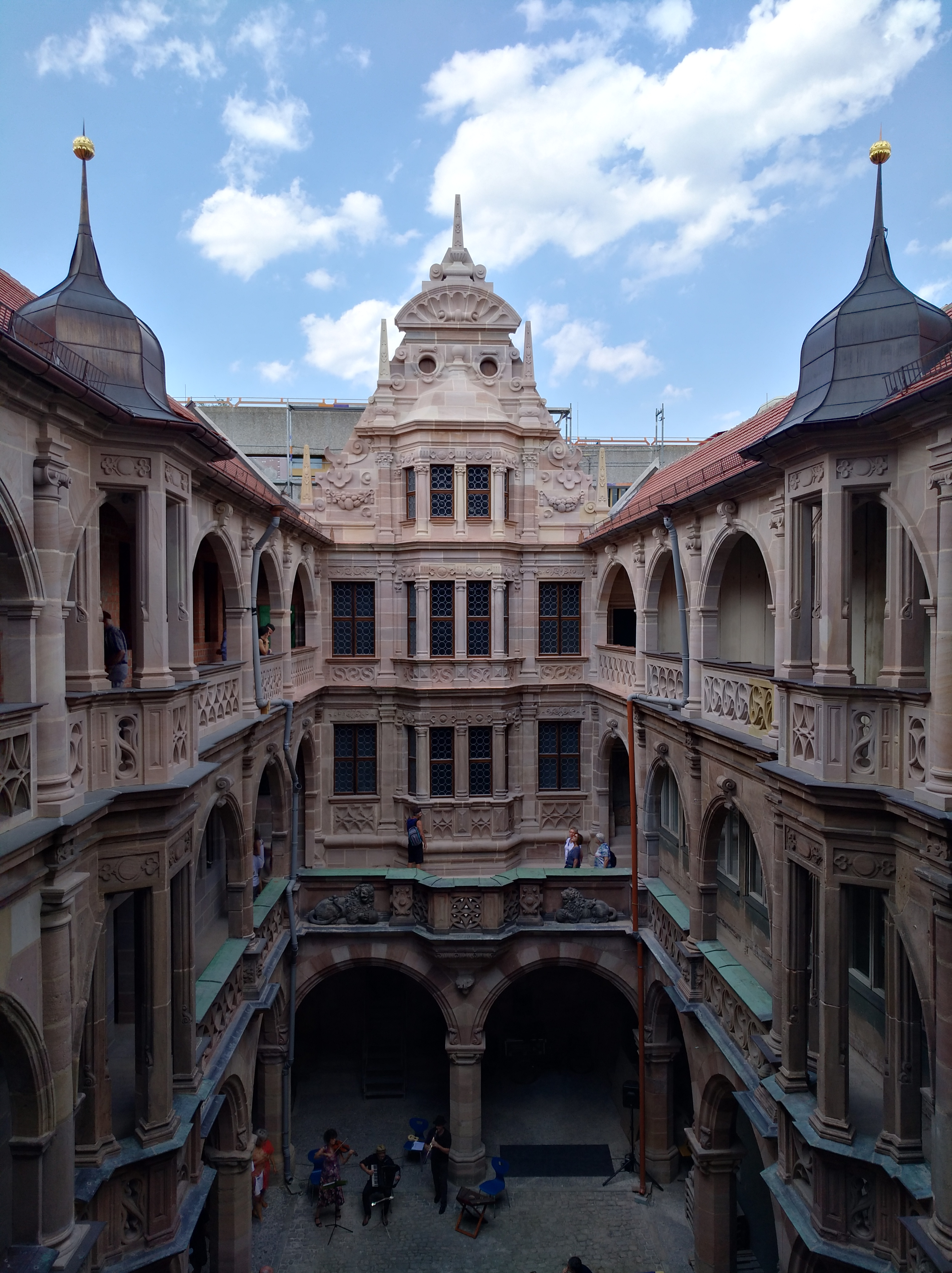 Pellerhof, Blick auf den Nordgiebel